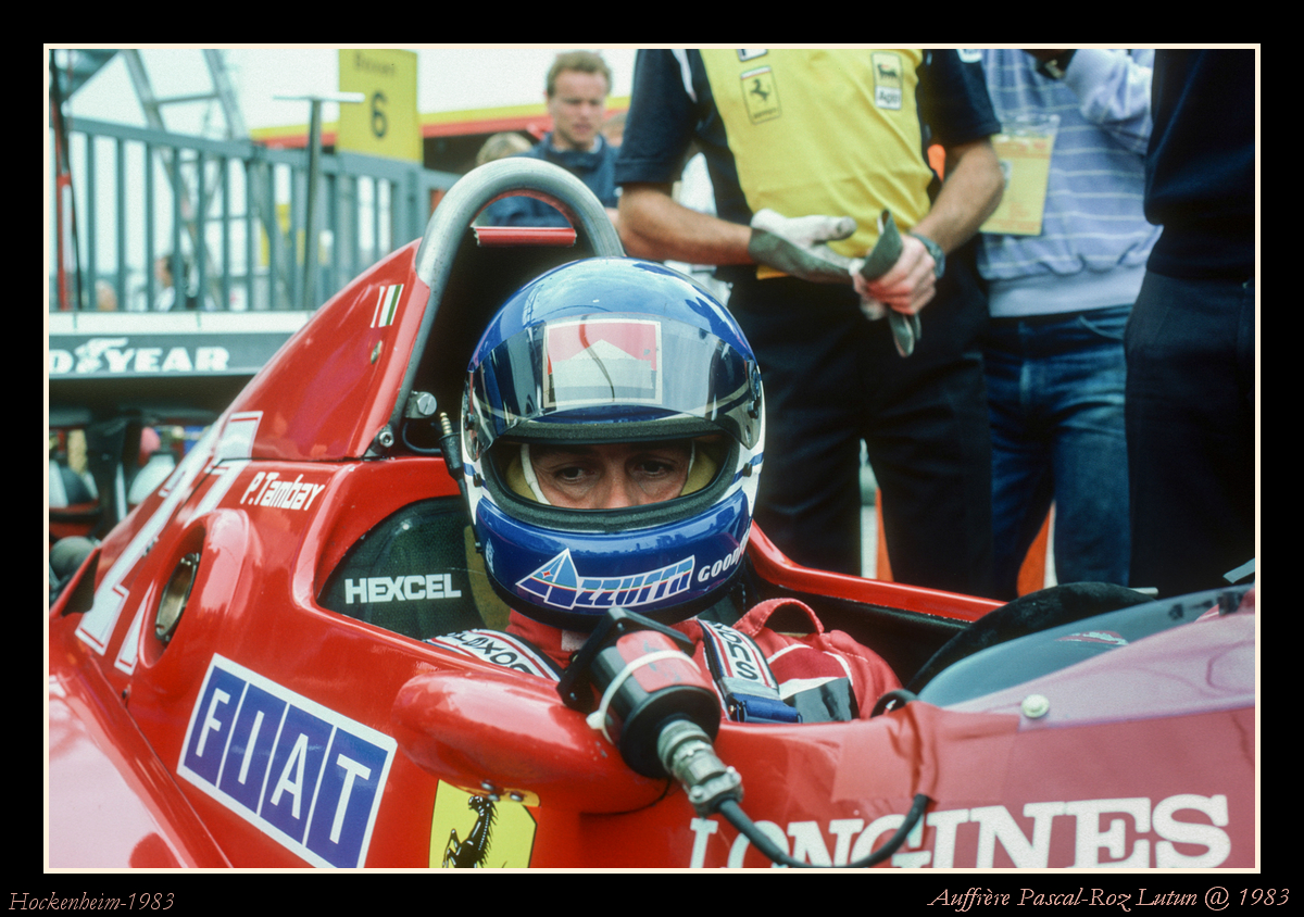 Hockenheim-1983-Patrick Tambay